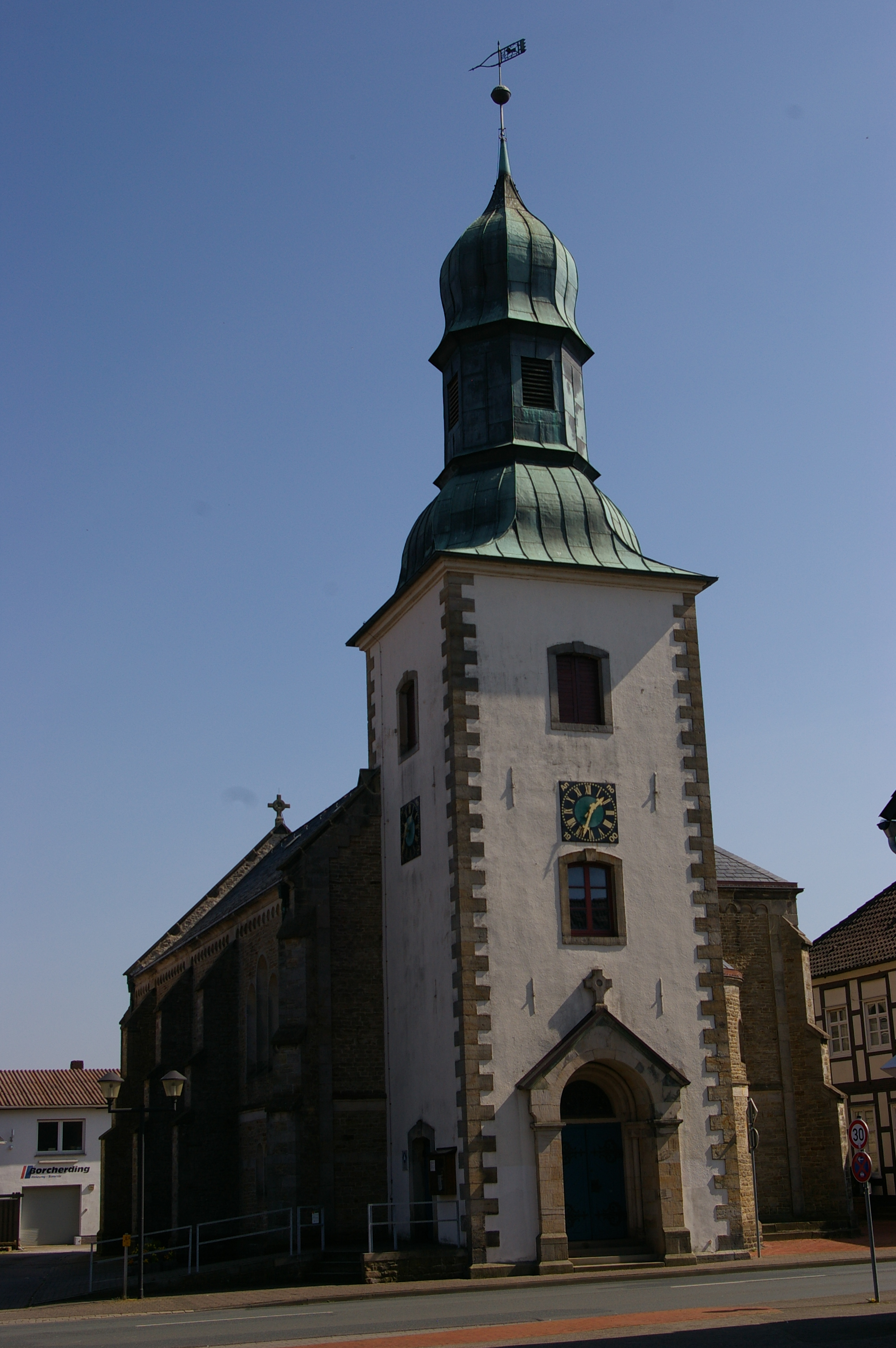 Evangelische Kirche